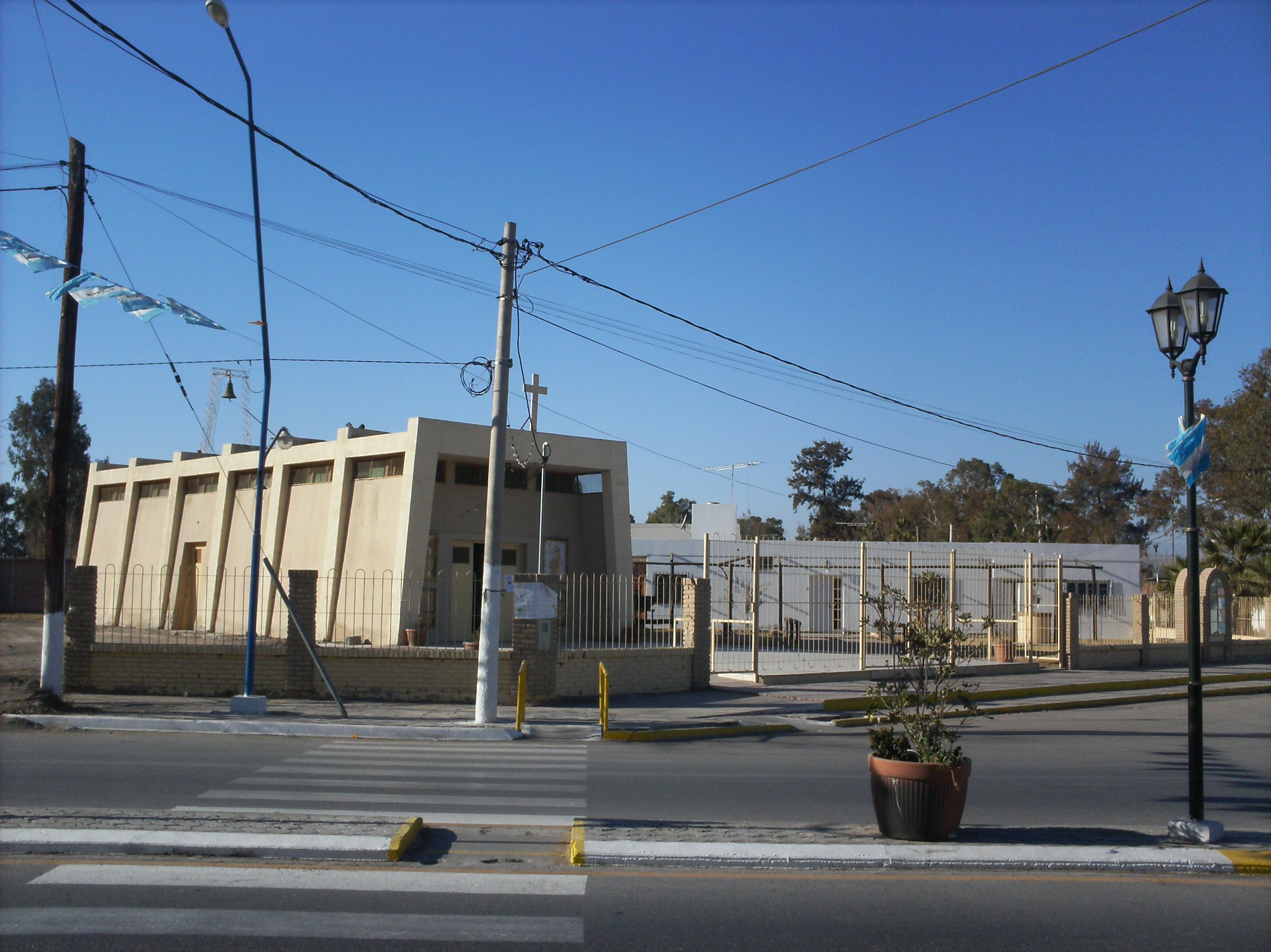 la iglesia departamental